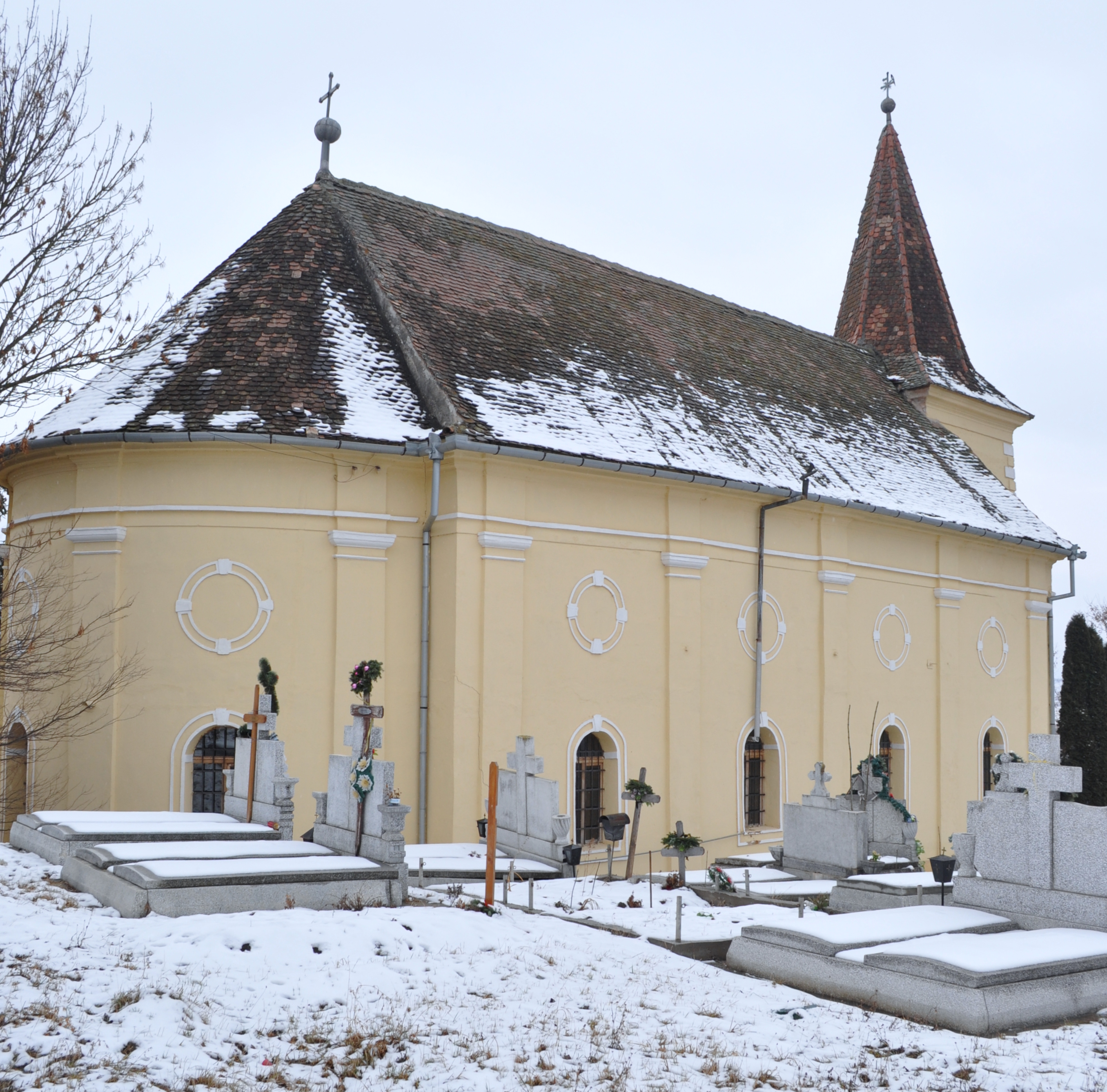 Biserica "Sfânta Maria" din Bungard, județul Sibiu 01